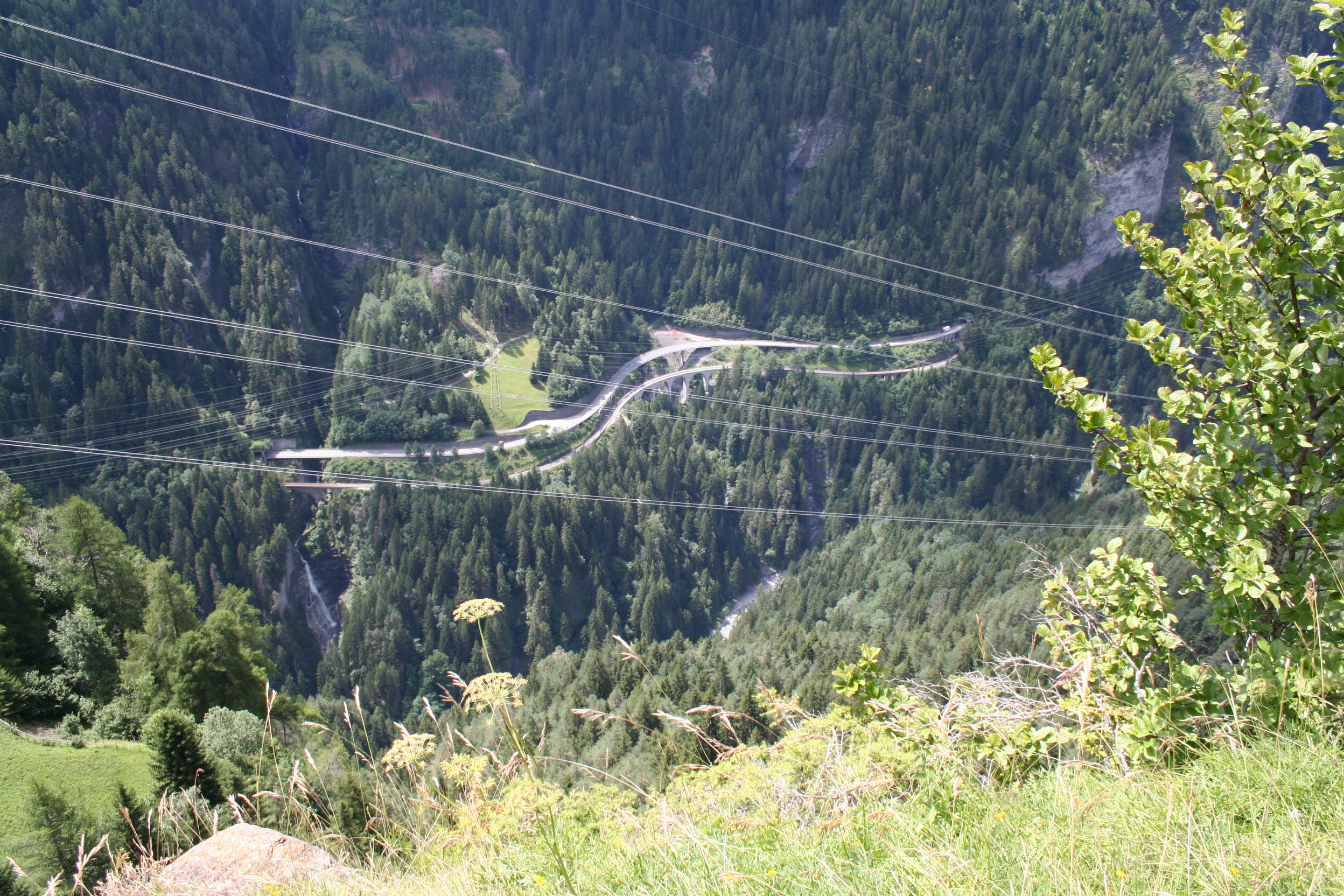 Schinschlucht, Blick Richtung SW